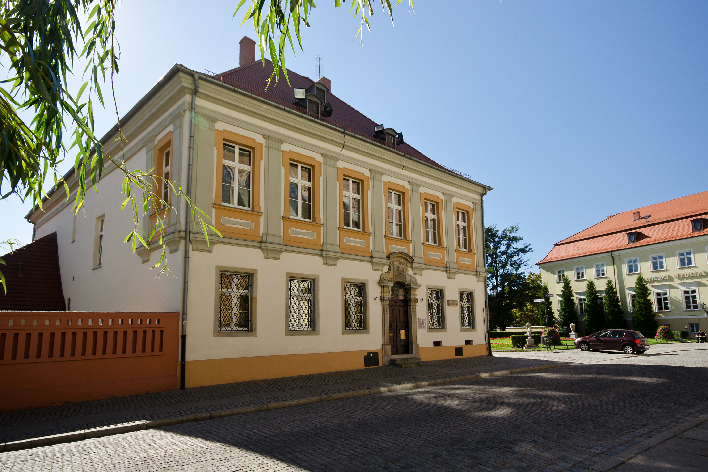 Wrocław Śródmieście, pl. Katedralny 5 – kanonia, obecnie rezydencja biskupa - sufragana, XIV, XVIII